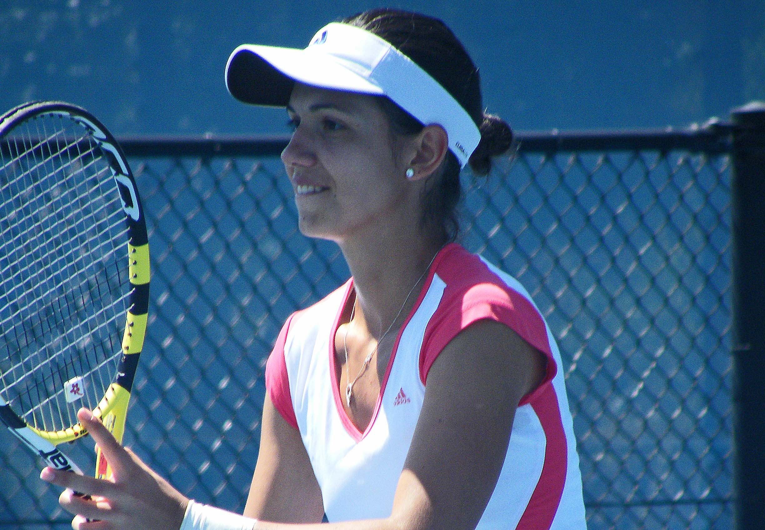 Ioana Raluca Olaru at the NSW Medibank Open Tennis 2010.